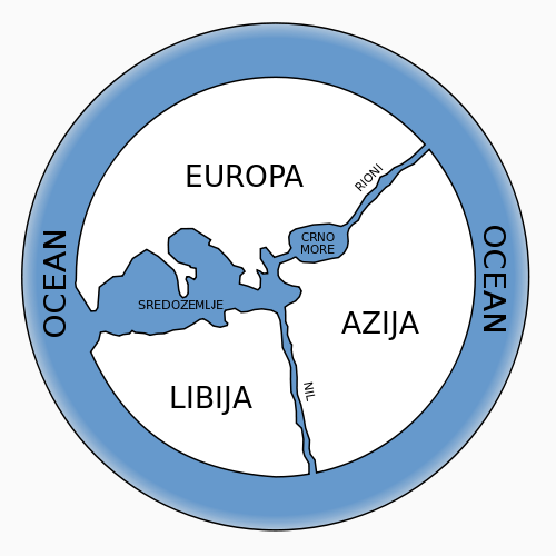 Rekonstruirana karta svijeta prema Anaksimandaru (6. st. pr. Kr.)